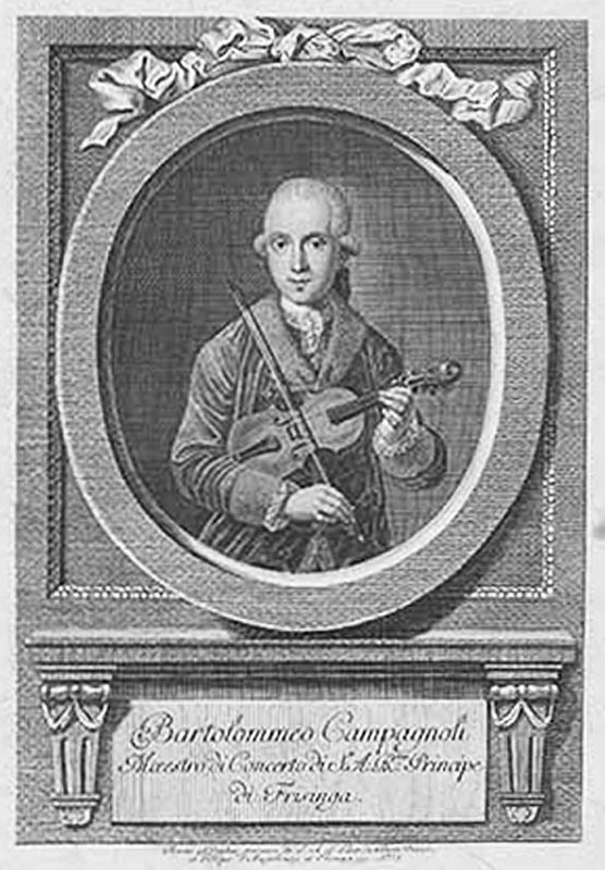 Der Violinist Bartolomeo Campagnoli 1778 während seiner Anstellung am Hofe von Freising